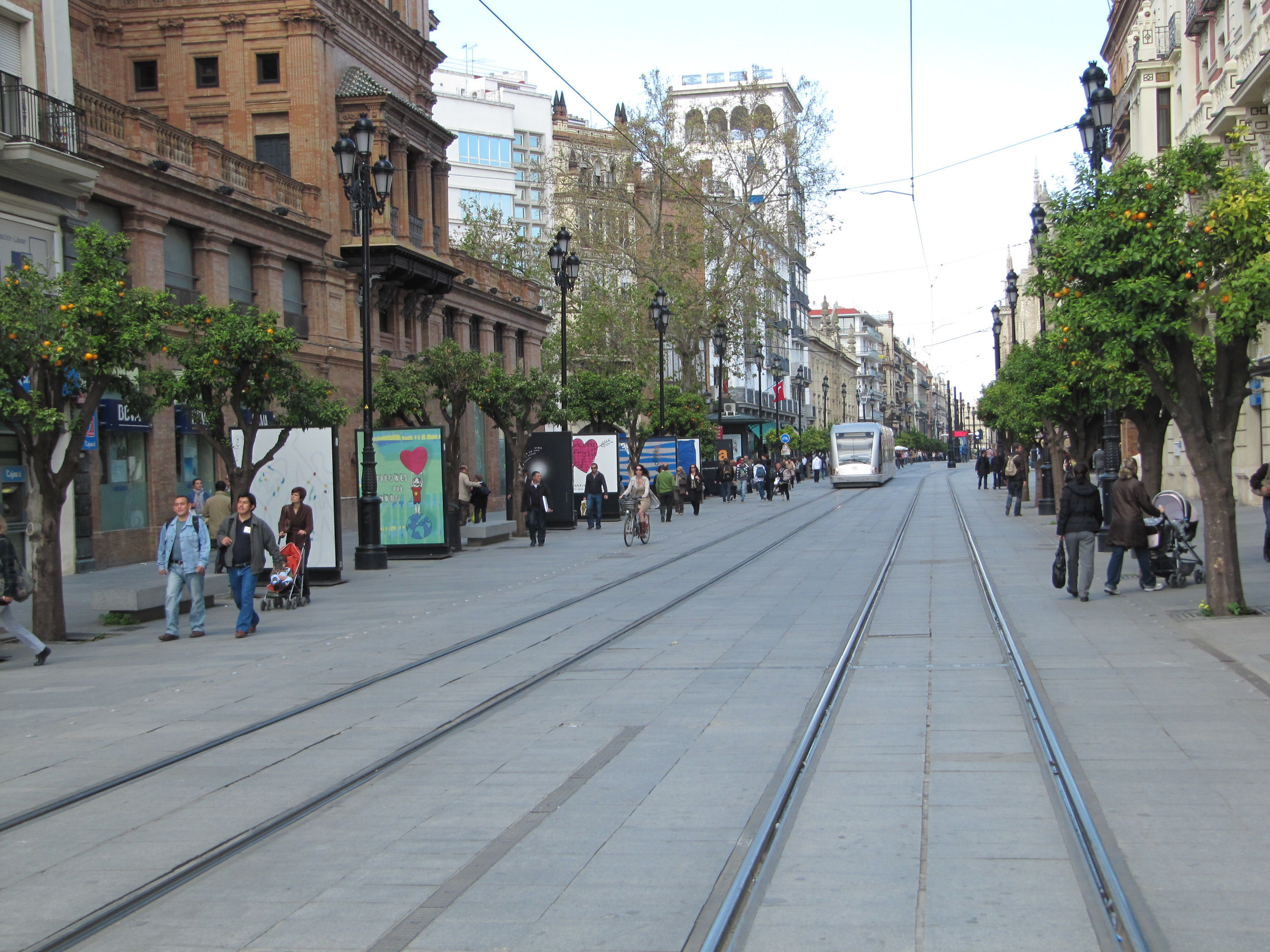 Sevilla - March 2011 - 033.jpg